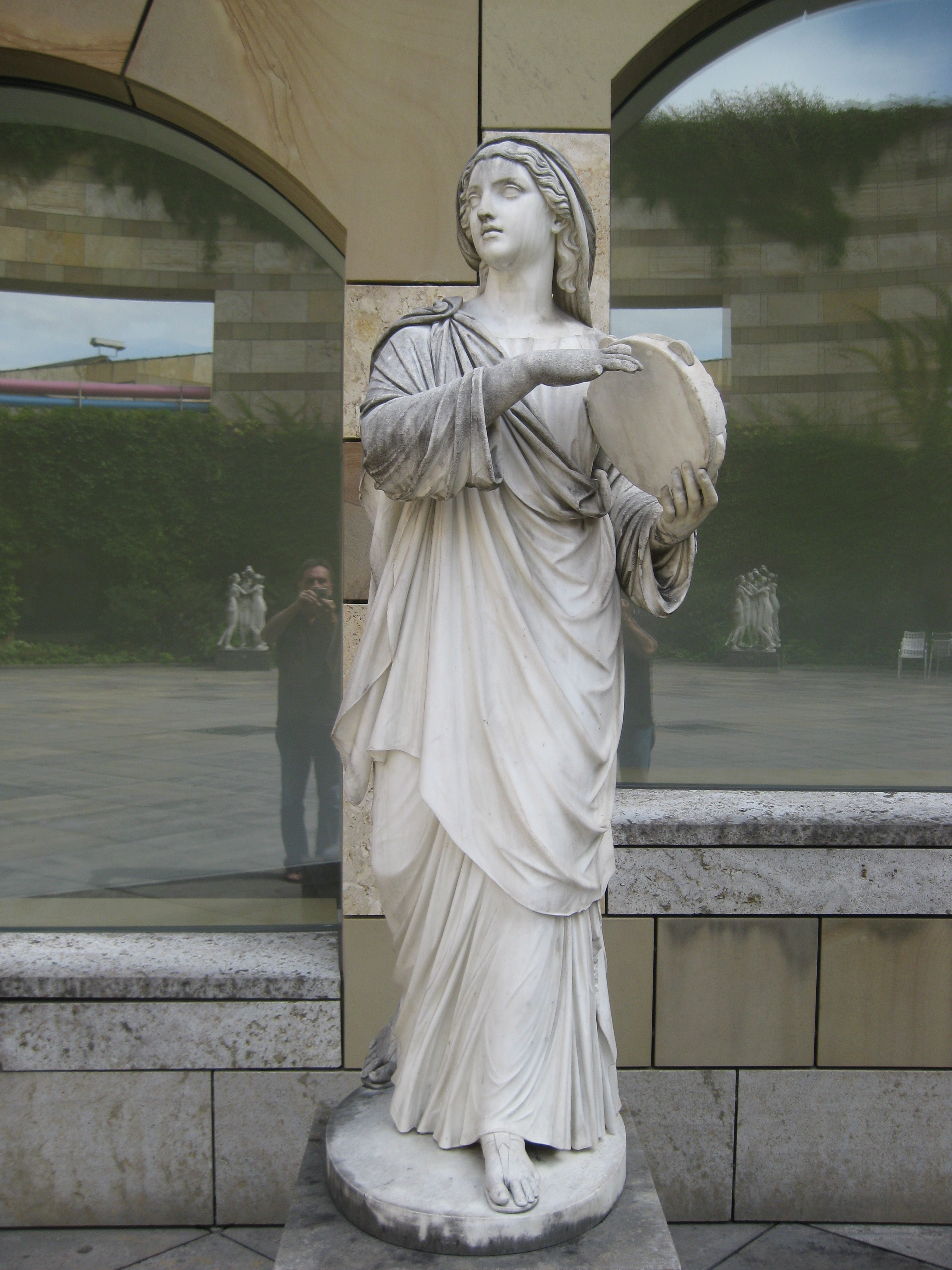 Heinrich Maximilian Imhof: Miriam oder Die Musik. Klassizistische Rundplastik der biblischen Prophetin Miriam auf runder Plinthe, Marmor, quaderförmiger Steinsockel, lebensgroß, bezeichnet: „HEINR. IMHOF. FEC. ROMA 1859“, Entstehungsjahr 1859, ursprünglich: Stuttgart, Villa Berg, unteres Vestibül, nach dem Zweiten Weltkrieg: Stuttgart, Städtisches Lapidarium, heute: Stuttgart, Staatsgalerie, Rotunde (als Leihgabe des Städtischen Lapidariums). Erhaltungszustand: gut, jedoch fehlen Fingerglieder an der rechten Hand. Beim Auszug aus Ägypten führte Mirjam nach der Durchquerung des Schilfmeers den Freudentanz und den Gesang der Frauen an. Die Statue zeigt eine tamburinschlagende Tänzerin mit klassischem Profil und in antiker Gewandung, jedoch verhüllt sie ihre Lockenpracht züchtig mit einem Tuch.